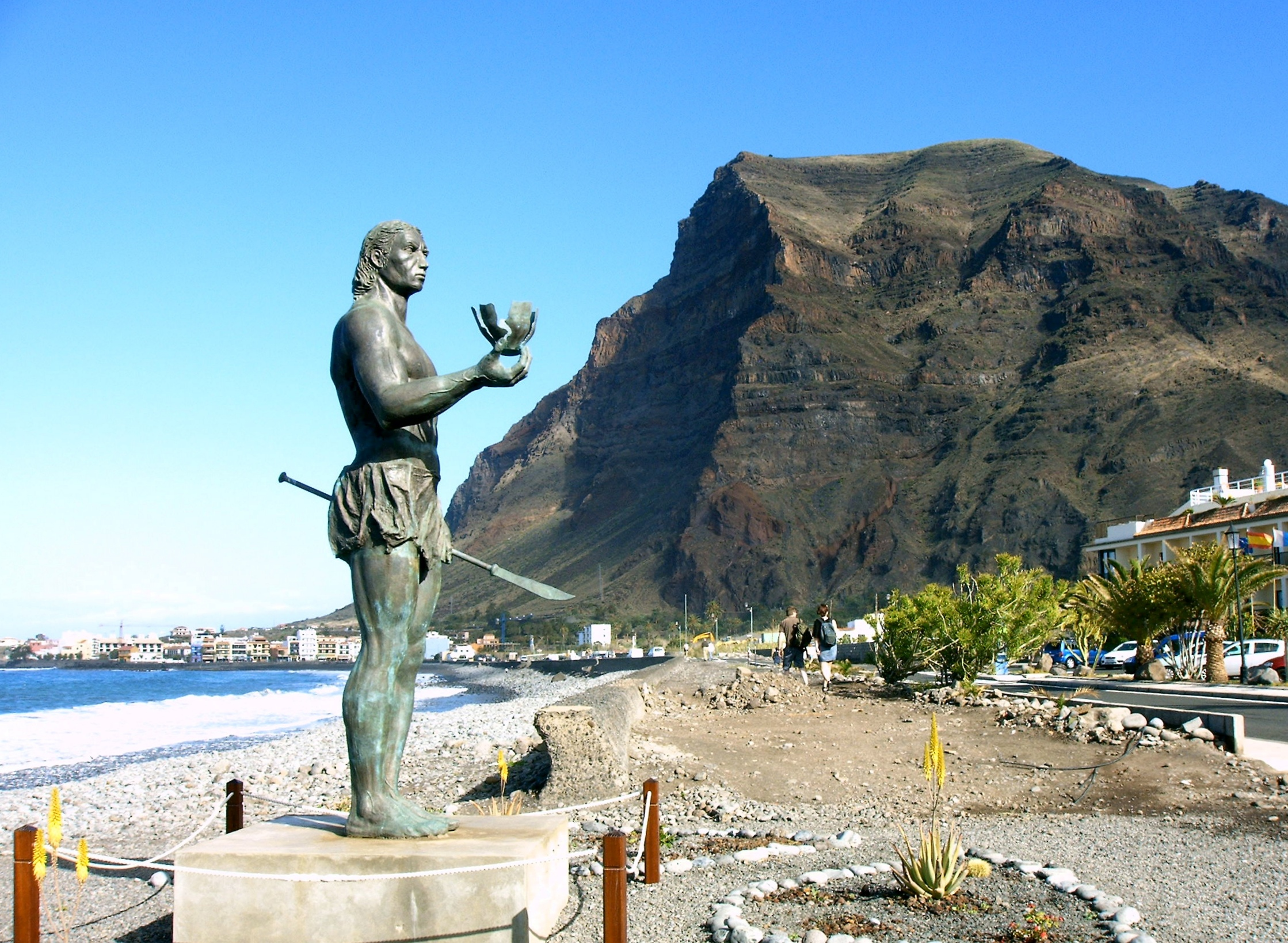 Statue des Hautacuperche im Valle Gran Rey, La Gomera